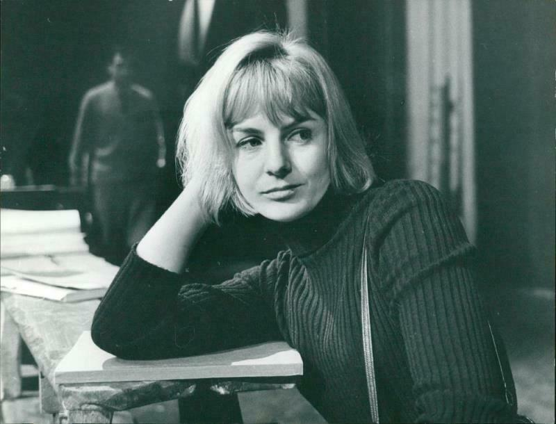 Foto på Inga Sarri infört i Svenska Dagbladet 1964-11-18.